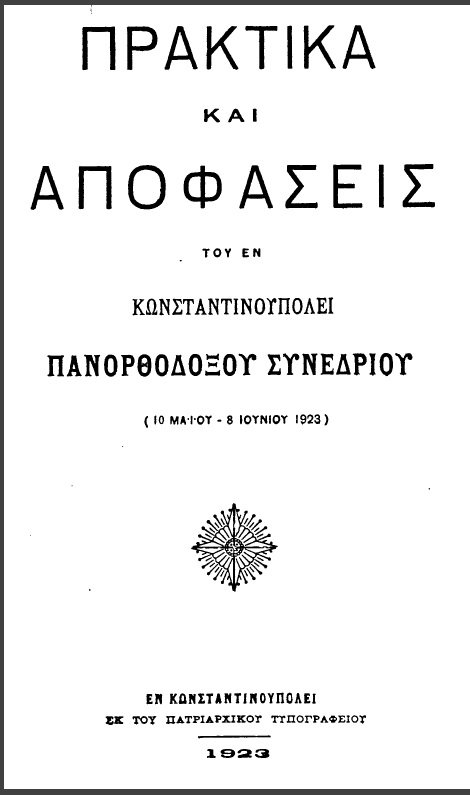 Титульный лист "Деяний и решений Константинопольского " Всеправославного конгресса"" 1923 года